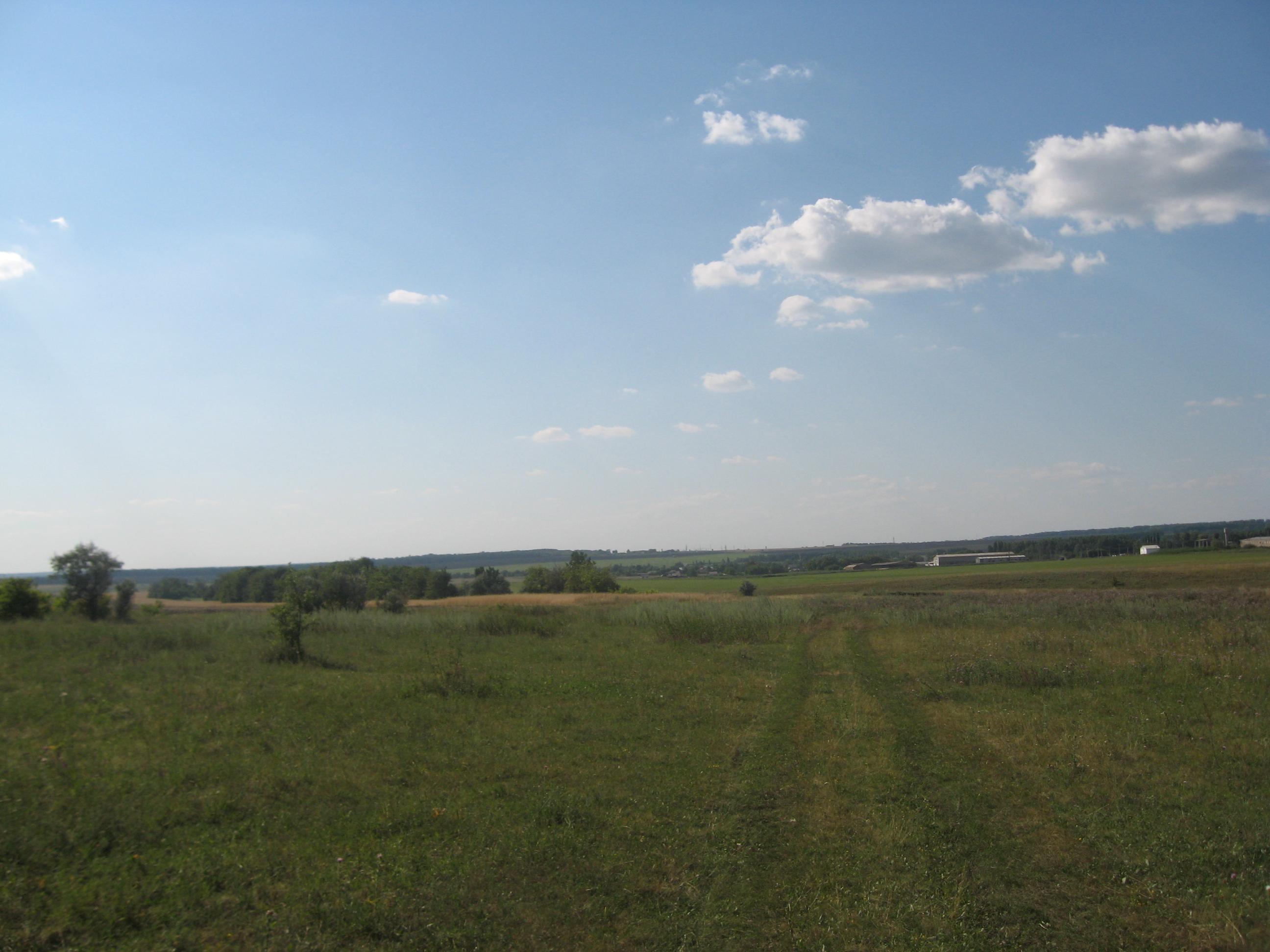 Грунтовая дорога в Моховое. Видно село.